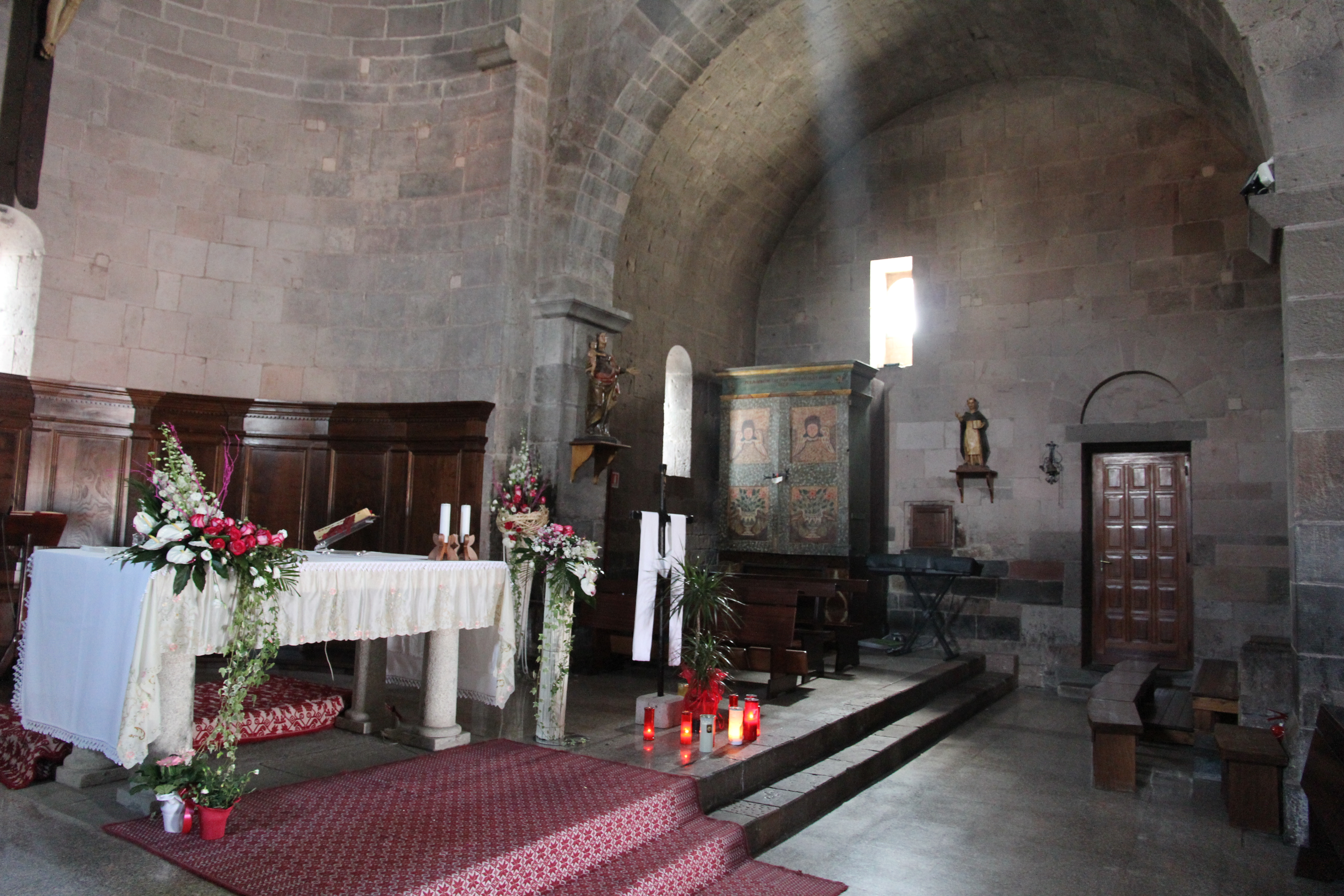 Ottana - Chiesa di San Nicola